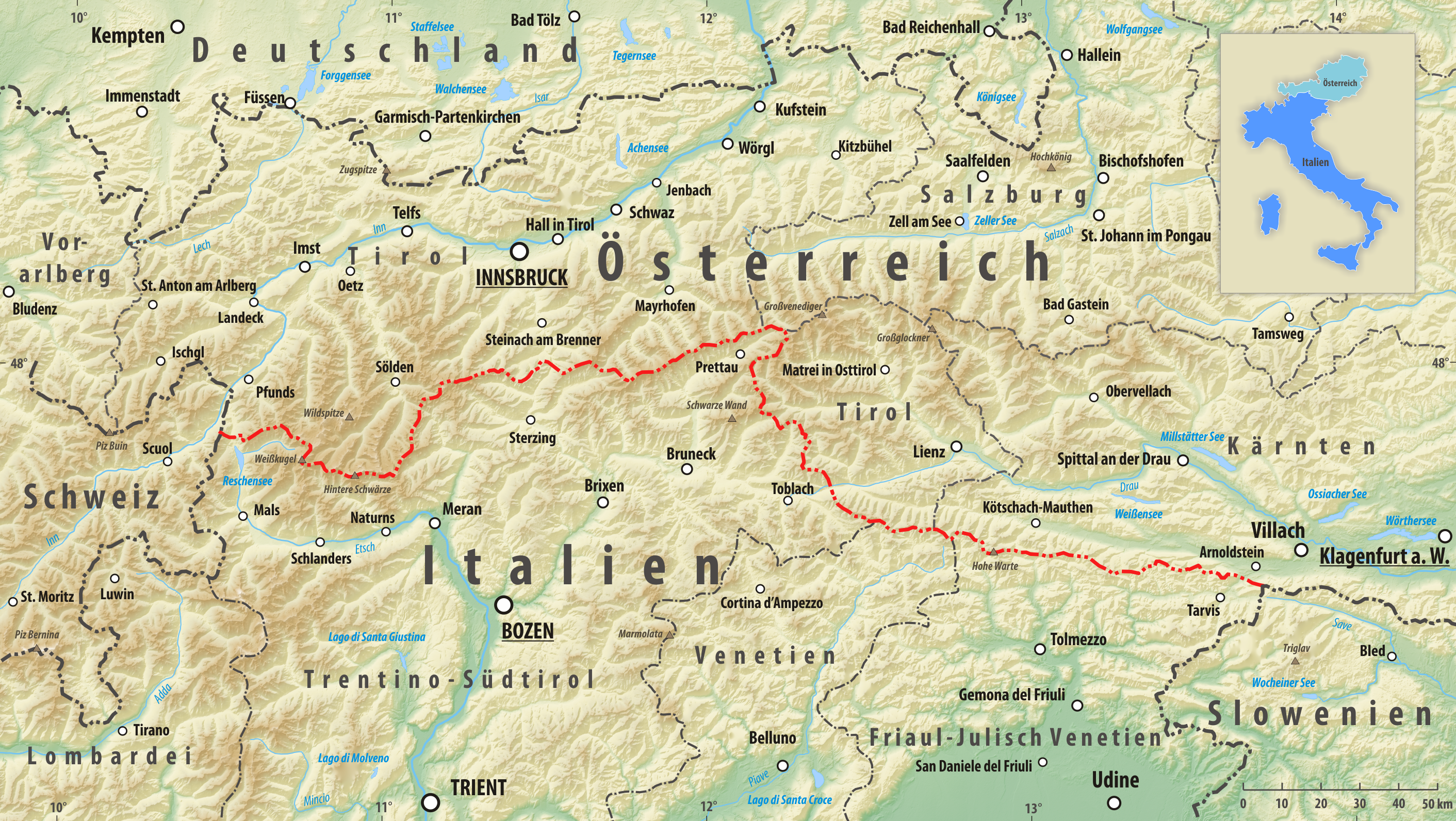 Reliefkarte des Grenzverlaufes zwischen Österreich und Italien Topographischer Hintergrund: NASA Shuttle Radar Topography Mission (public domain). SRTM3 v.2.